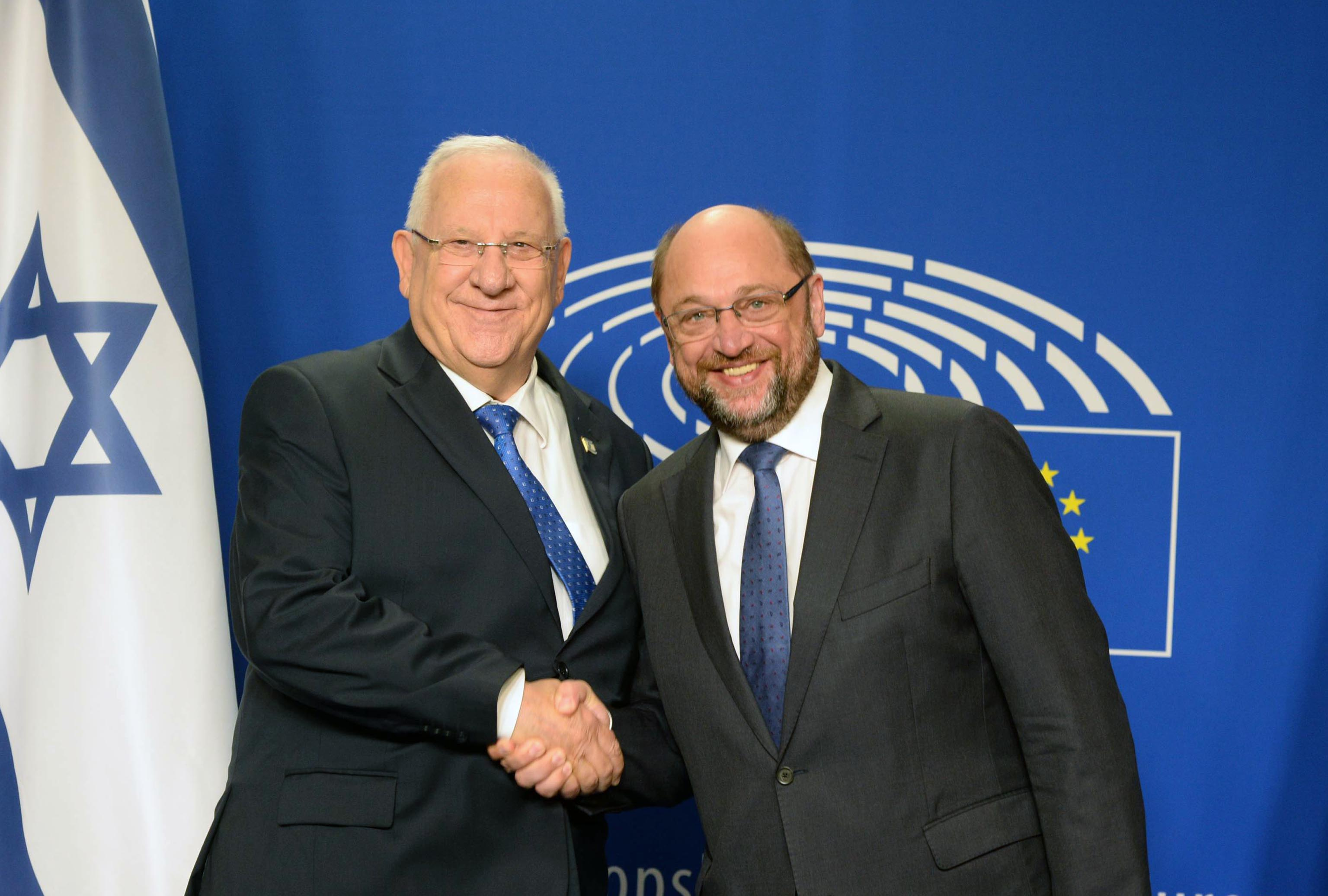 נשיא האיחוד האירופי מרטין שולץ עם נשיא מדינת ישראל ראובן ריבלין בעת ביקורו בפרלמנט האיחוד האירופי